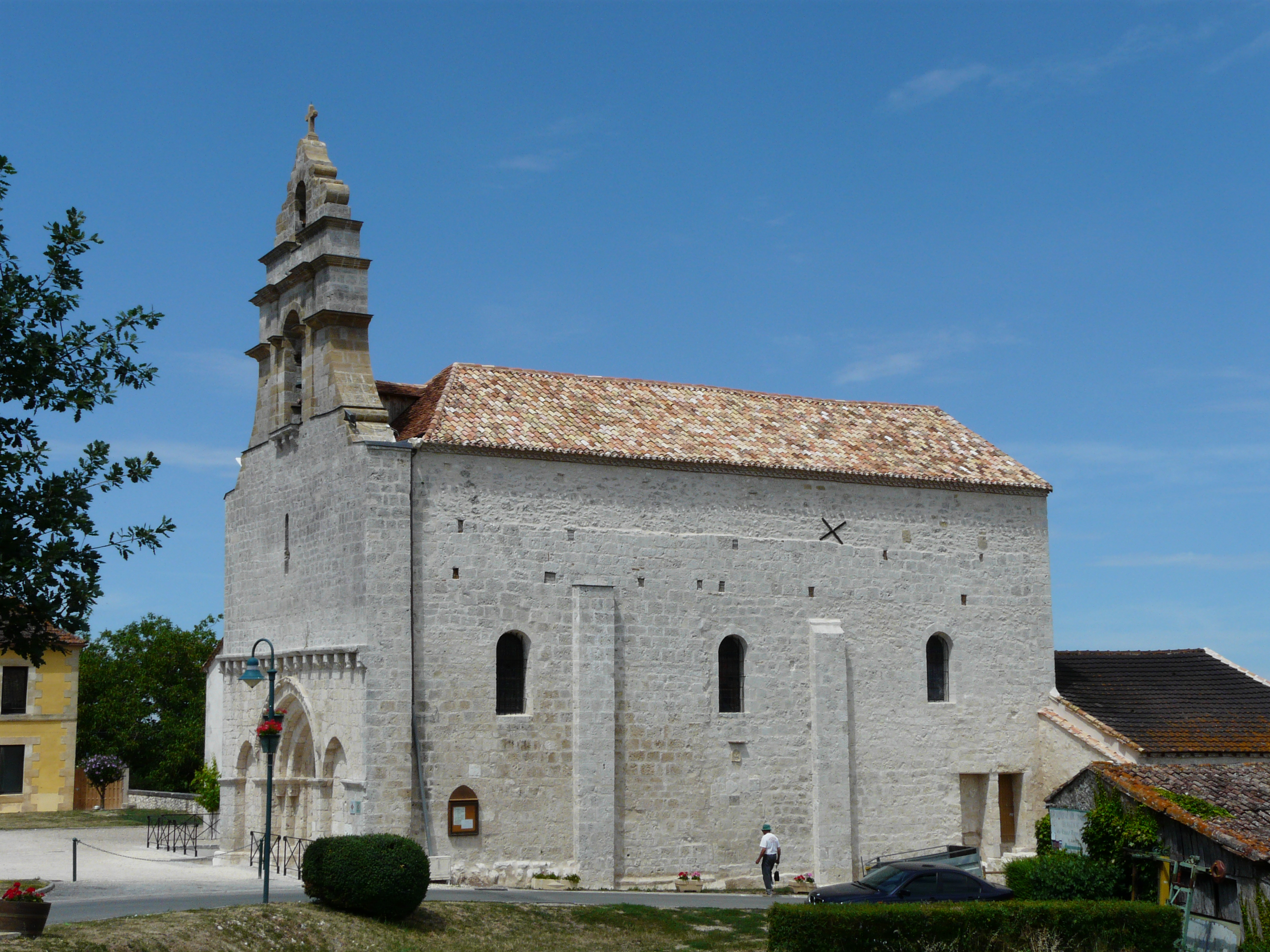 La façade sud de l'église Saint-Jean-Baptiste, Saint-Nexans, Dordogne, France.